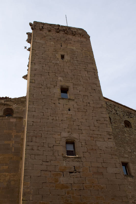 castell d'Aranyó a la Segarra-Catalunya